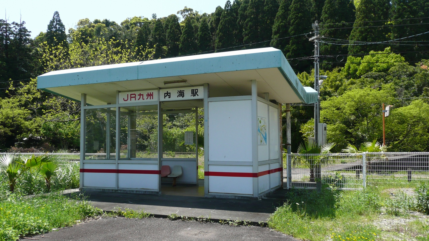 内海駅（日南線、日本）